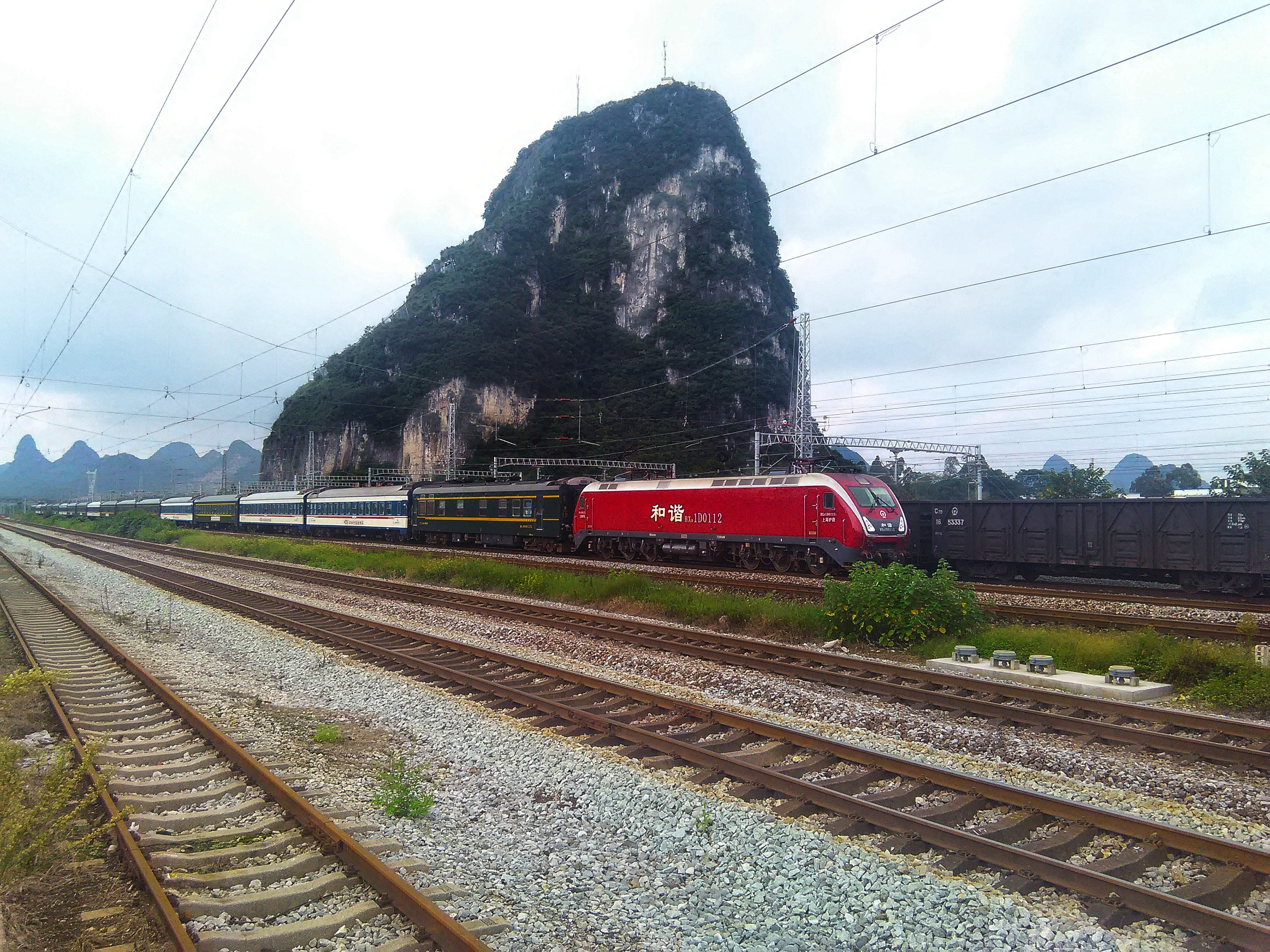 T382次列车在进德站一度停车。